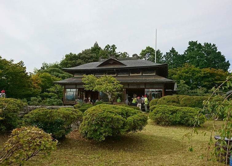 丹後ちりめんで富を築いた吉村家が、商談などにも用いた桜山山頂の別荘。